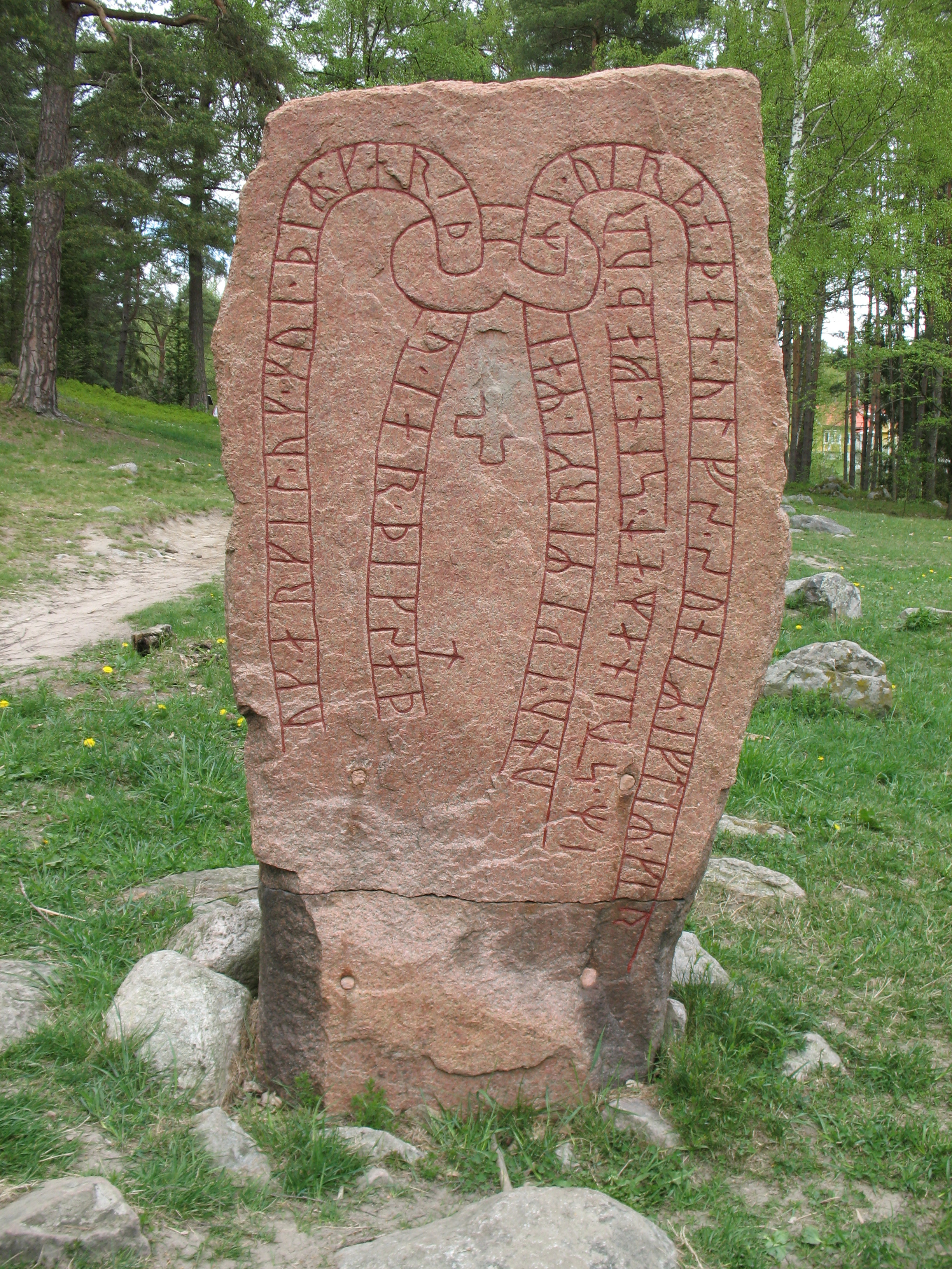 Runestone U 225 in Vallentuna.